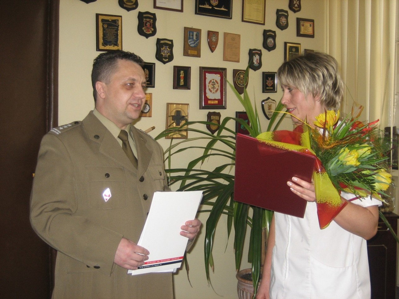 Szczecin, 2006r. Komendant 109 Szpitala Wojskowego wyróżnia pielęgniarkę roku